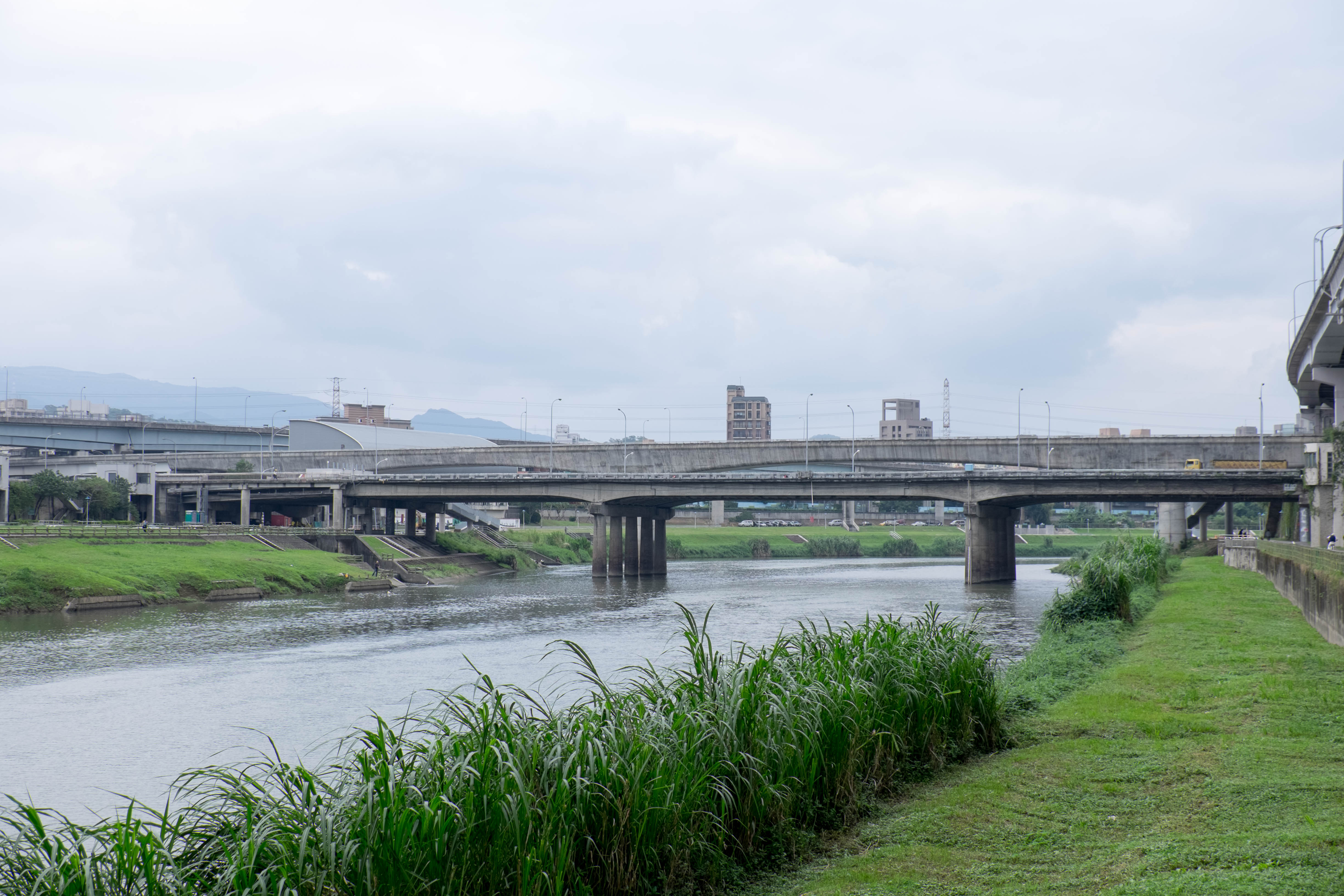 中文（台灣）: 從基隆河南岸河堤疏散橋頂遠望南湖大橋西側。